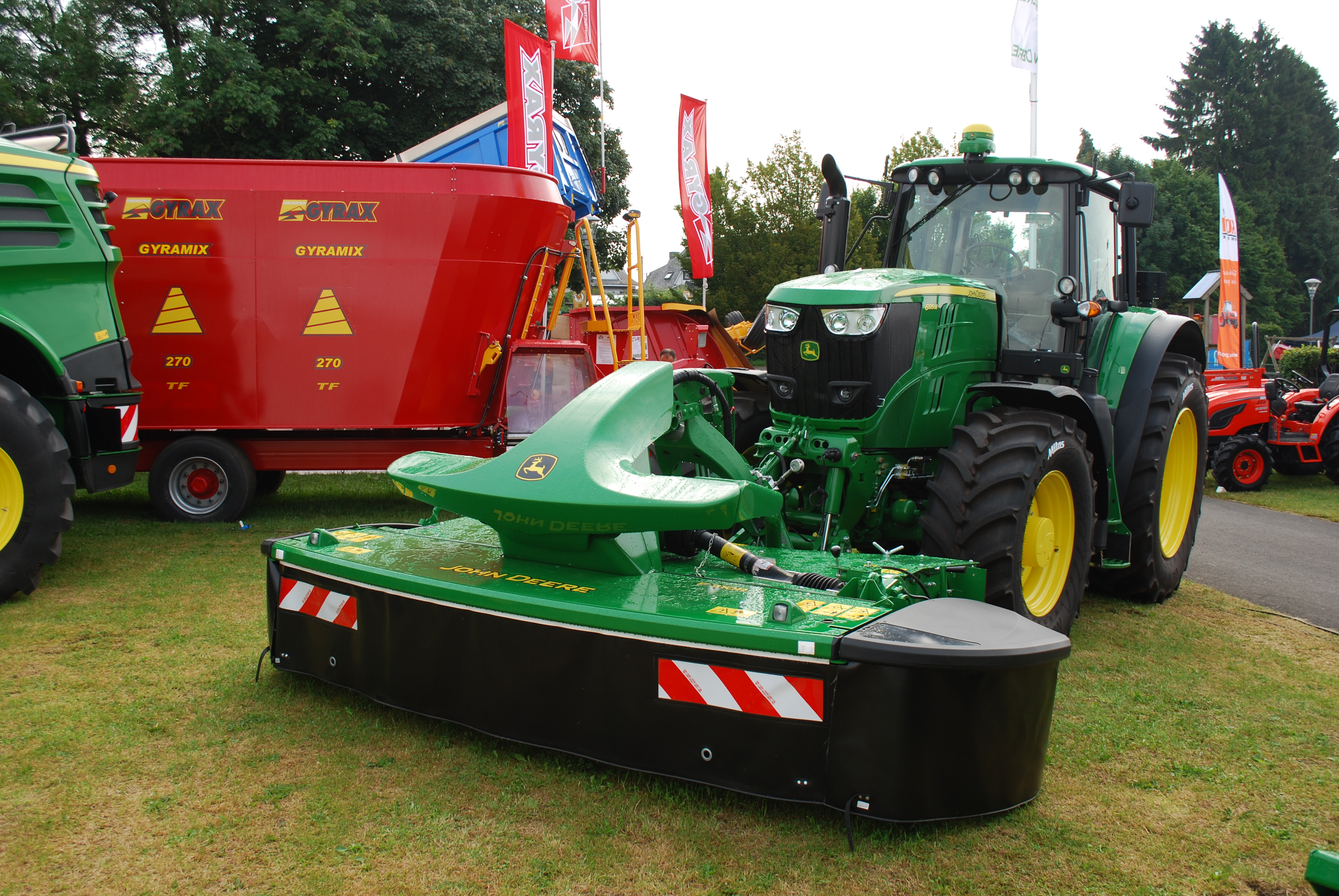 Vue de la Foire agricole de Libramont, dans le Luxembourg belge (82e édition en 2016).